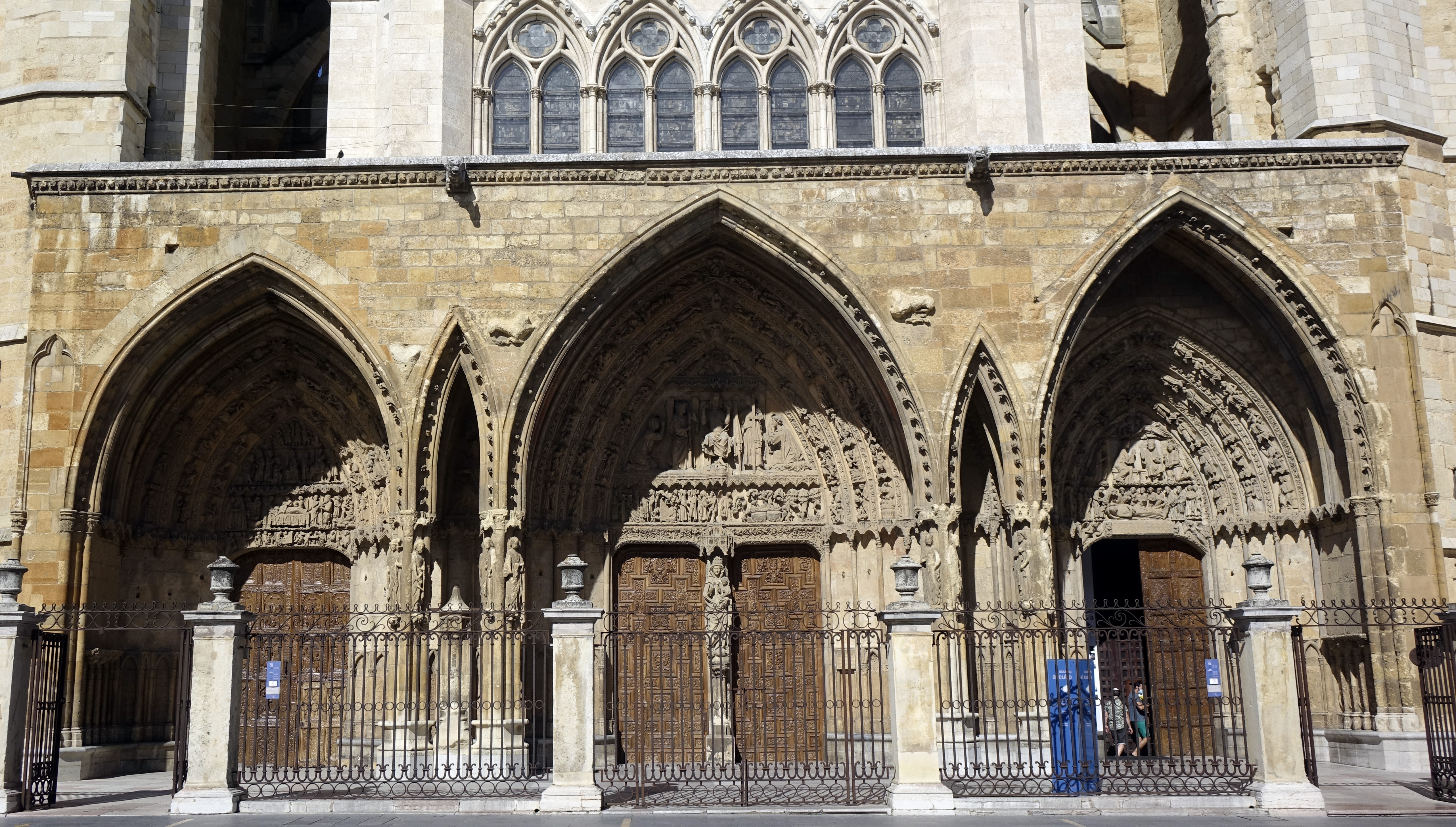 Triple pórtico occidental de acceso a la catedral de León.